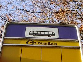 Buurtbushalte in Heino, eigen foto